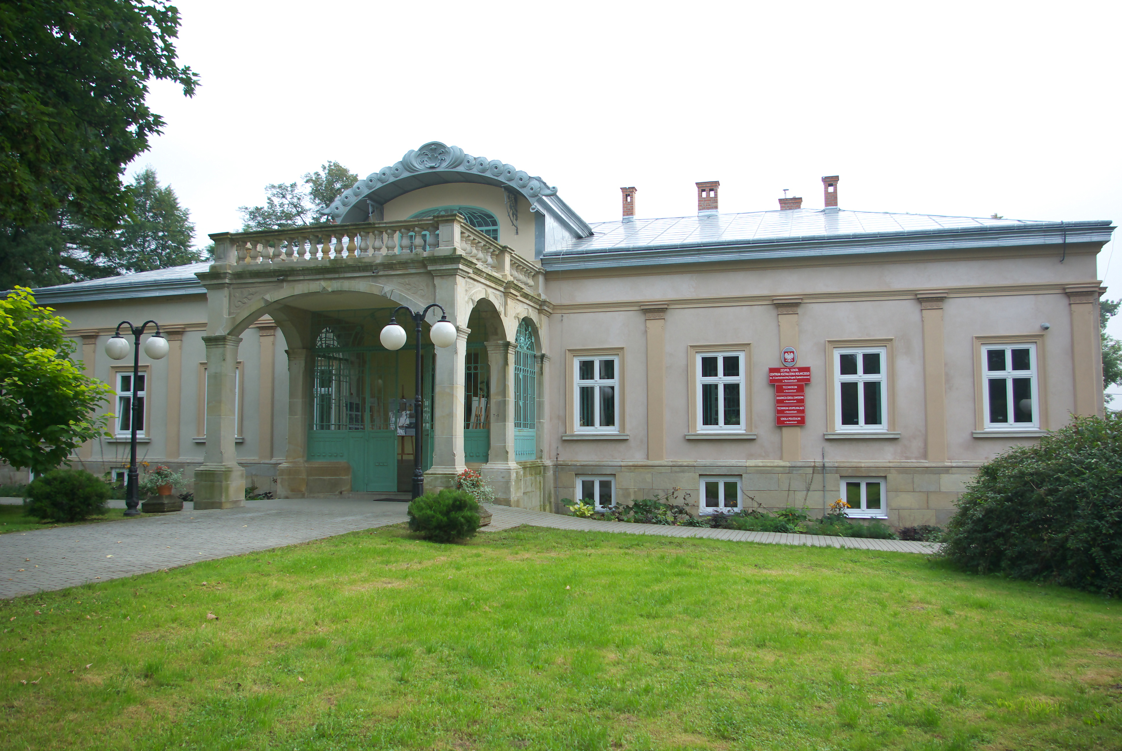 Budynek dworski w Nowosielcach. Obecnie Zespół Szkół Centrum Kształcenia Rolniczego im. II Czechosłowackiej Brygady Spadochronowej w Nowosielcach